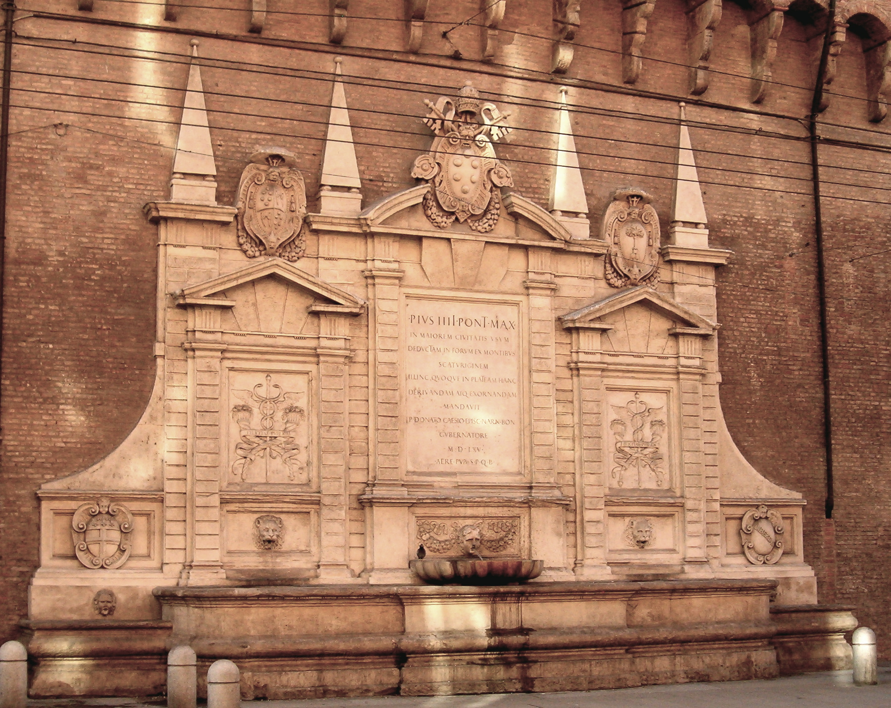 Bologna, fontana di papa Pio III Piccolomini.